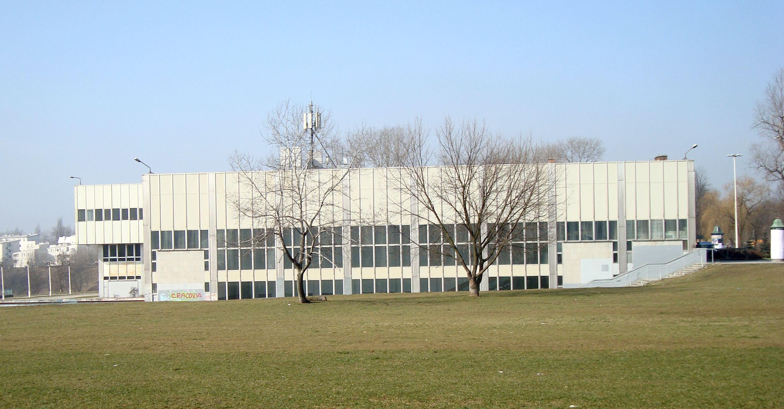 NCK widziany od strony Centrum E